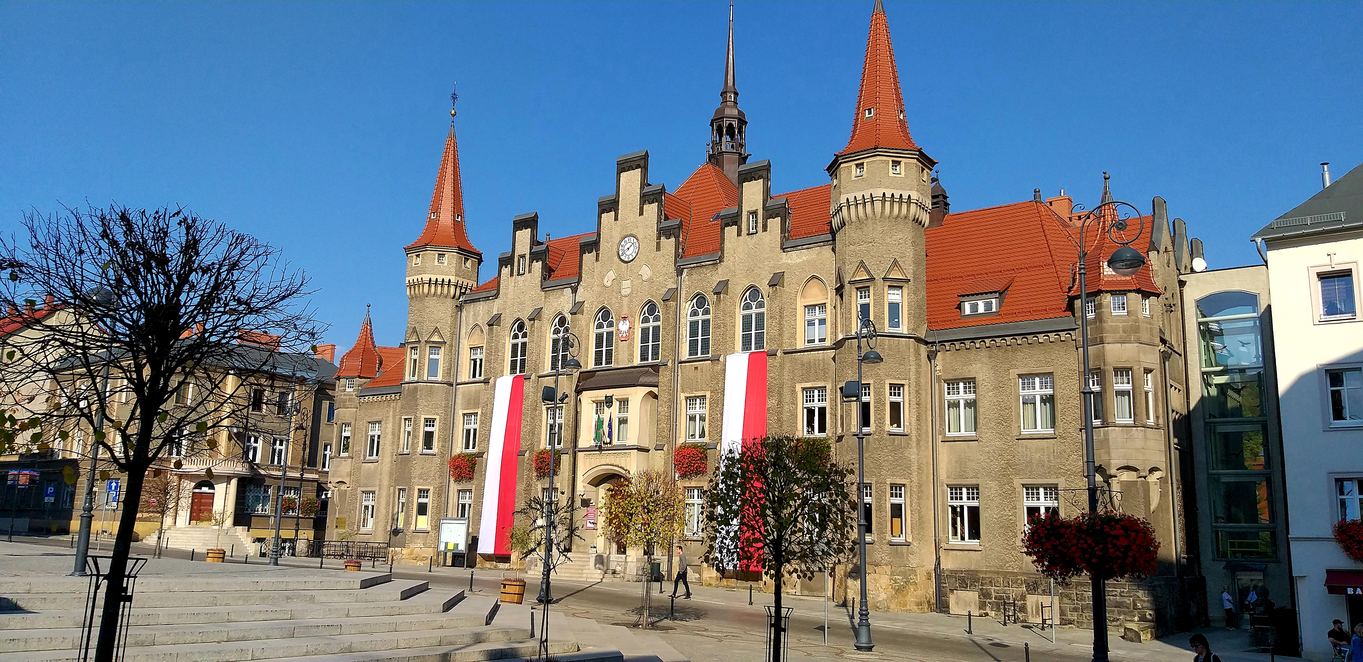 Ratusz w Wałbrzychu w narodowych barwach